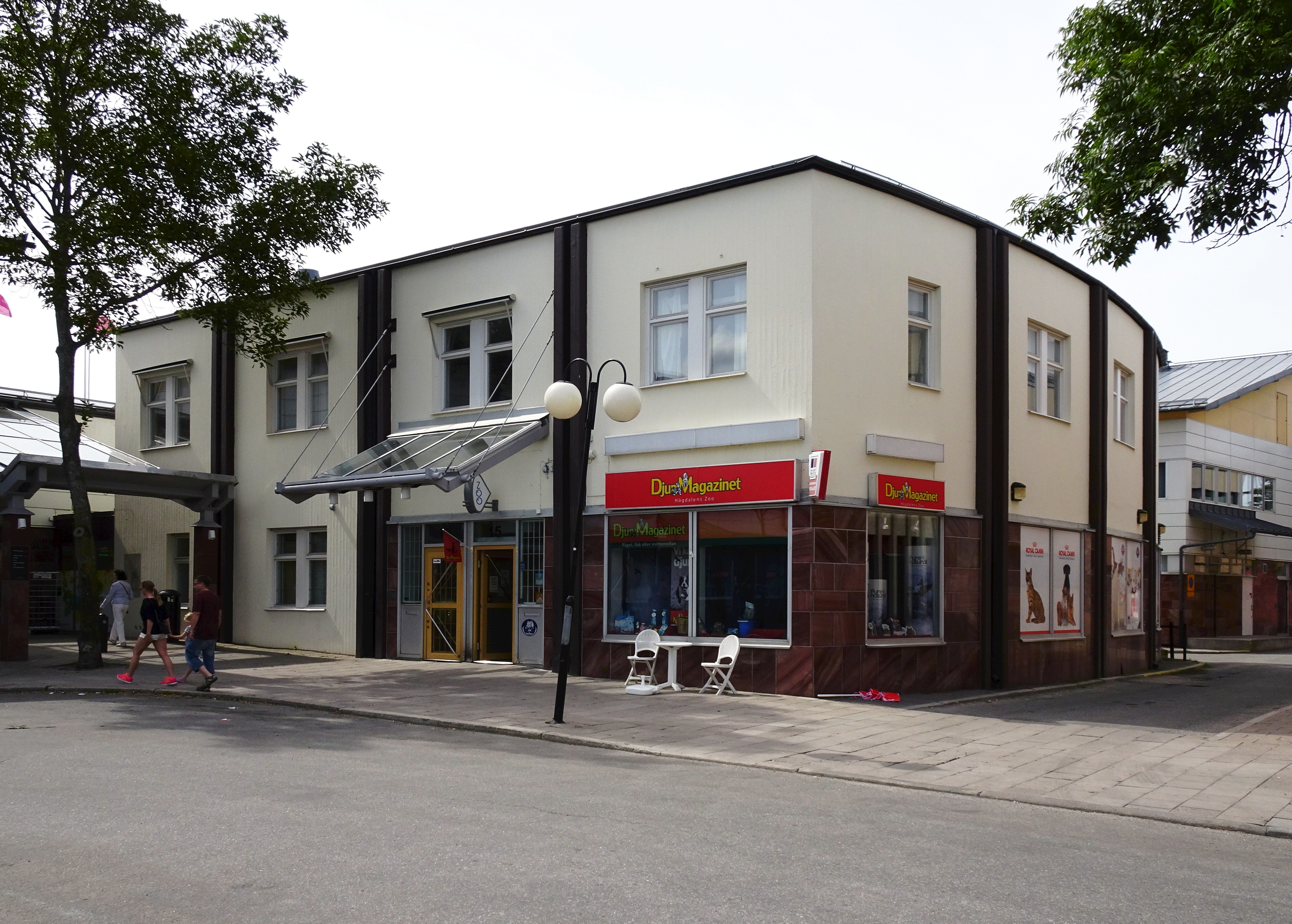 Före detta Biograf Rondo, Högdalens centrum (salongsbyggnad)